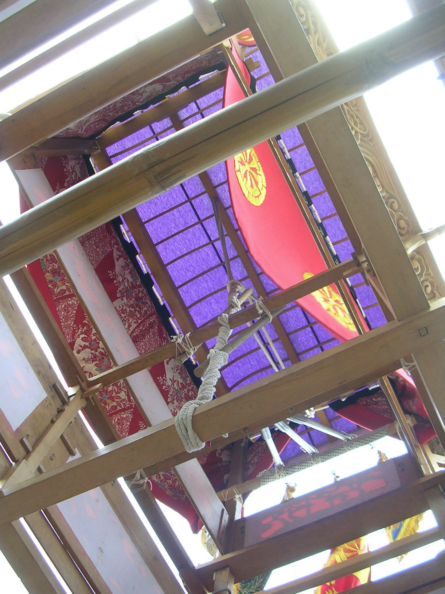 愛媛県 西条市 の祭礼「西条祭り」の楽車(だんじり)の内部。 山車型の屋台には珍しく「 担ぐ 」ことを前提とした構造のため 透かし彫りの飾り面で覆われた内部はほぼ完全な空洞となっているが 構造自体は非常に頑強で壊れにくく､奉納中の激しい揺れや衝撃にも耐えうる工夫がされている。 これは歴年の楽車大工の伝統技巧の結晶であり、その意味では楽車を飾る彫刻と並び 隠れた芸術品と呼ぶべき非常にレベルの高い工芸品でもある。